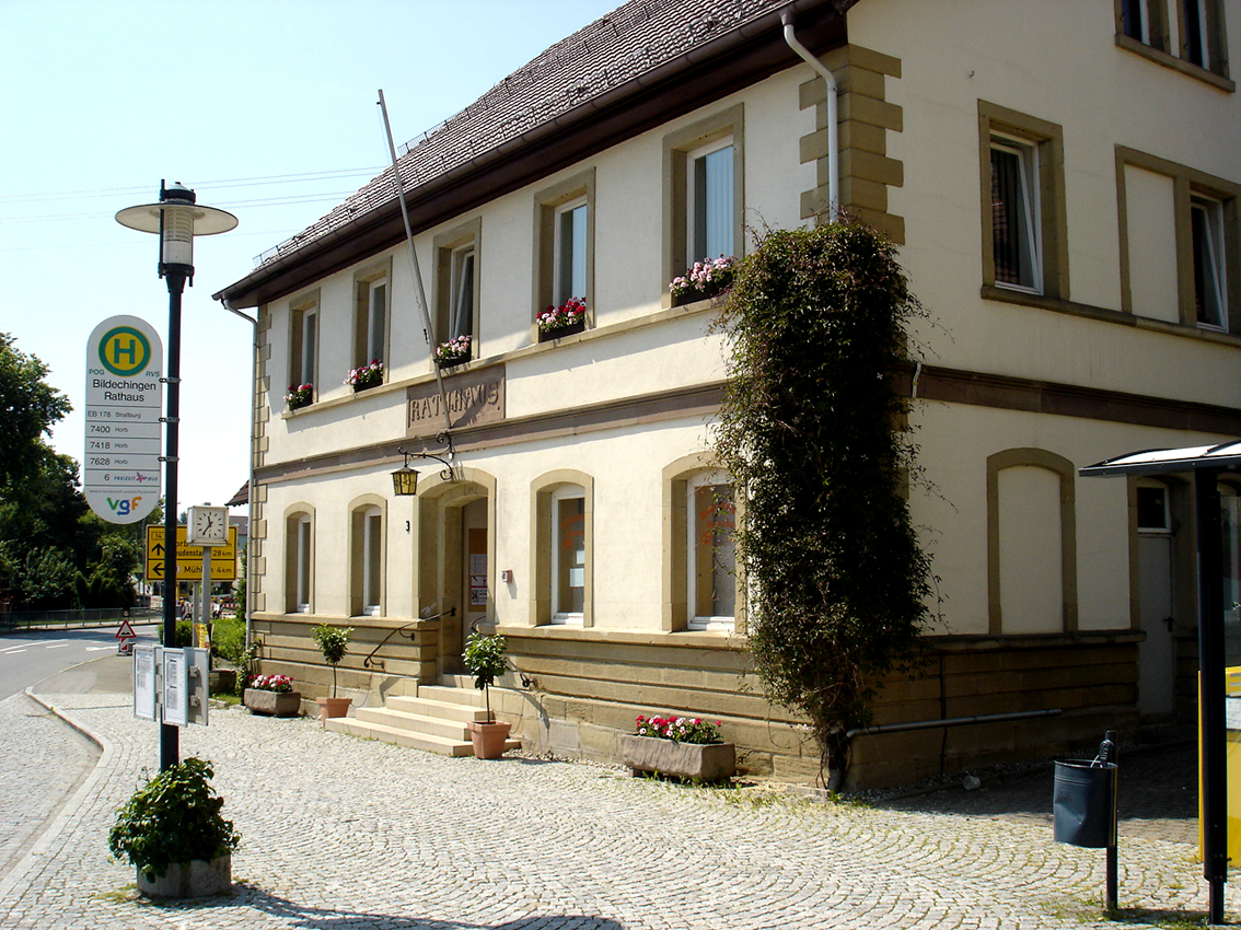 Rathaus Bildechingen mit Bushaltestelle. Auf dem Haltestellenschild ist noch die 2007 eingestellte Fernbuslinie Reutlingen – Straßburg vermerkt.